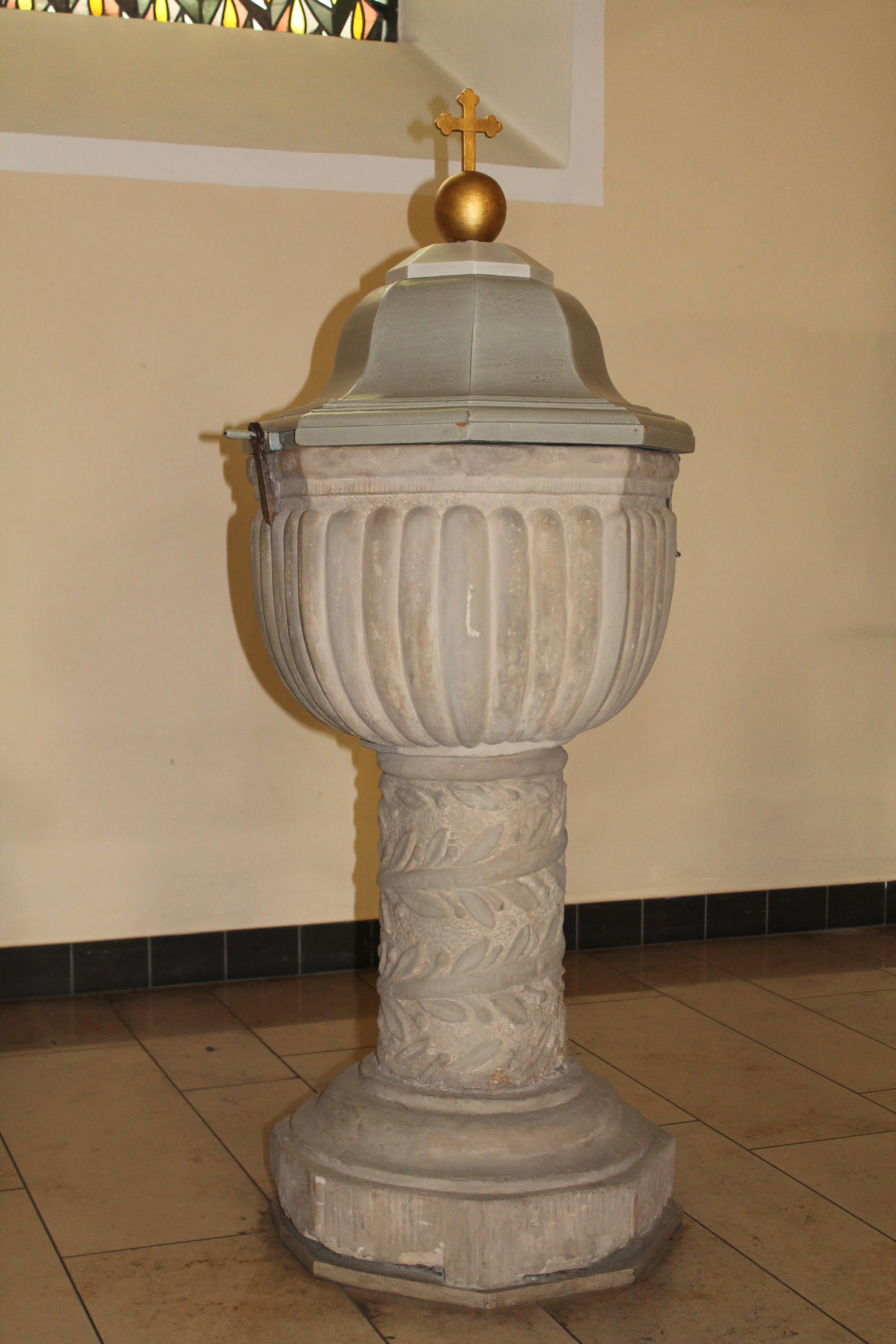 Taufstein